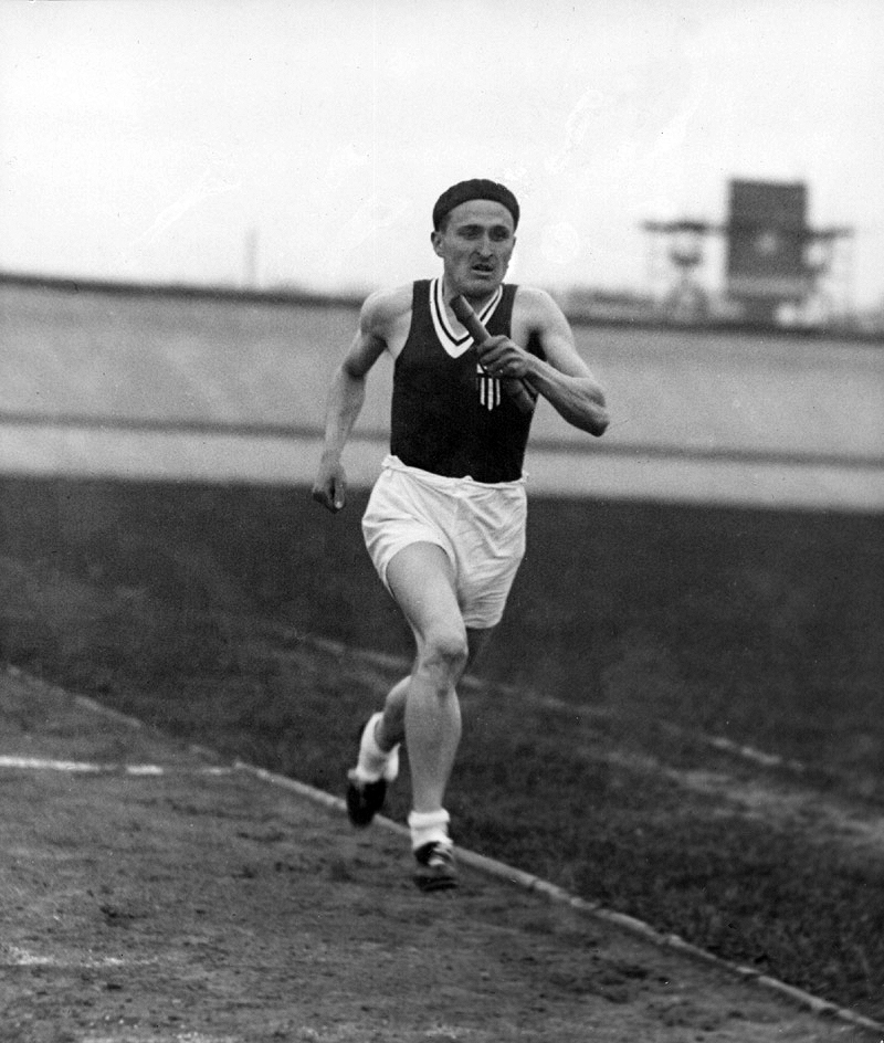 Komentarz: Janusz Kusociński, przydomek “Kusy” (1907-1940), rekordzista świata, mistrz olimpijski, wielokrotny rekordzista i mistrz Polski w biegach długich. W 1928 uzyskał po raz pierwszy tytuł mistrza Polski w biegu na 5 tys. m. Na igrzyskach olimpijskich w Los Angeles w 1932 zdobył, jako pierwszy mężczyzna w dziejach sportu polskiego, złoty medal olimpijski w biegu na 10 tys. m. W czasie swojej kariery sportowej ustanowił na różnych dystansach 19 rekordów Polski, dwa światowe i po jednym Europy i Olimpiady. Zdobył niezwykłą popularność. Przydomek “Kusy” łączył elementy nazwiska z cechami fizycznymi biegacza. Za udział w kampanii wrześniowej, odznaczony był Krzyżem Walecznych. 26 III 1940 został aresztowany przez gestapo, a następnie rozstrzelany 21 VI 1940 r. w Palmirach pod Warszawą. Dla uczczenia jego pamięci, od 1945 organizowane są w Warszawie doroczne międzynarodowe zawody lekkoatletyczne o “Memoriał Janusza Kusocińskiego”. W zasobie Archiwum Dokumentacji Mechanicznej znajduje się 140 fotografii dotyczących Janusza Kusocińskiego. Lokalizacja: ze zbiorów Archiwum Dokumentacji Mechanicznej Miejsce: Warszawa Opis zewnętrzny: Oryginalna fotografia czarno-biała o wymiarach 16,5x19,5 cm Miejsce przechowywania: Archiwum Dokumentacji Mechanicznej, Zespół IKC sygn. I-S-744 Autor komentarza: Urszula Wieczorek Autor fotografii: Leon Jarumski